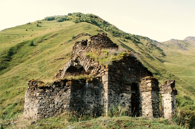 არდოტის ეკლესია